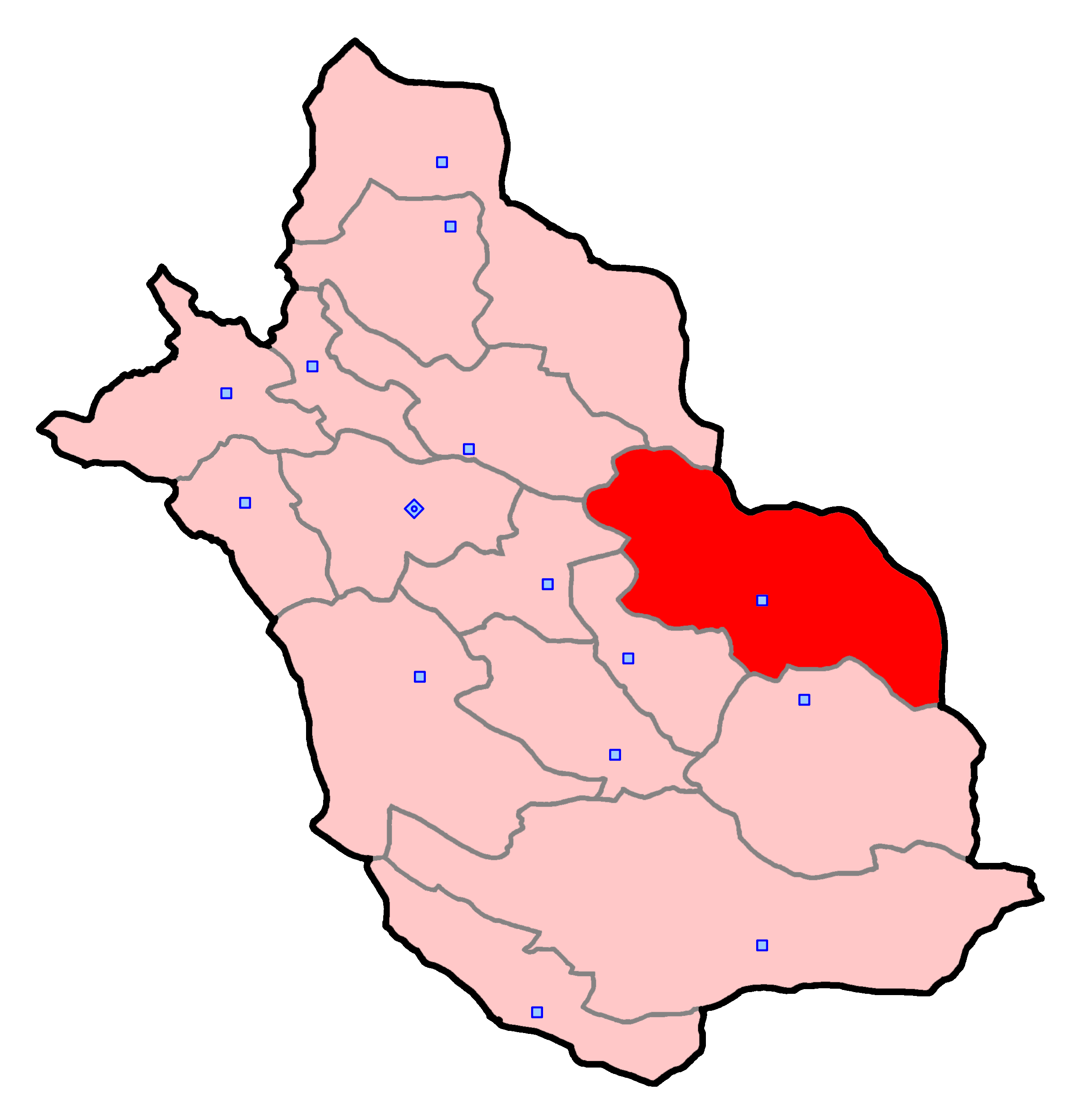 حوزهٔ انتخاباتی نی‌ریز و استهبان برای انتخابات مجلس شورای اسلامی